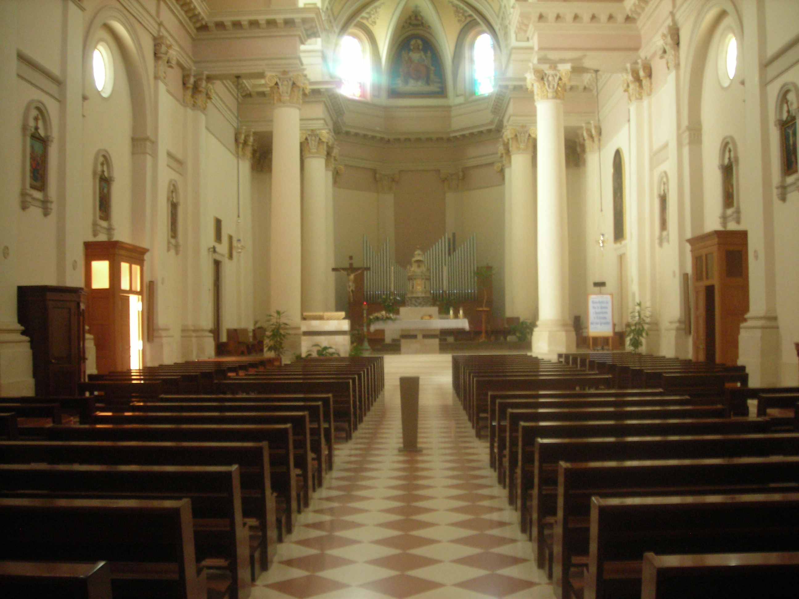 interno della Chiesa nuova di San Giorgio Martire